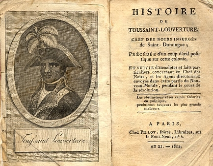 "Toussaint Louverture by Charles-Yves Cousin d'Avallon (1769-1840). Full title: "Histoire de Toussaint Louverture, chef des noirs insurgés de Saint-Domingue; précédée d'un coup d'œil politique sur cette colonie, et suivie d'anecdotes et faits particuliers concernant ce chef des noirs, et les agents directoriaux envoyés dans cette partie du Nouveau-monde, pendant le cours de la revolution".